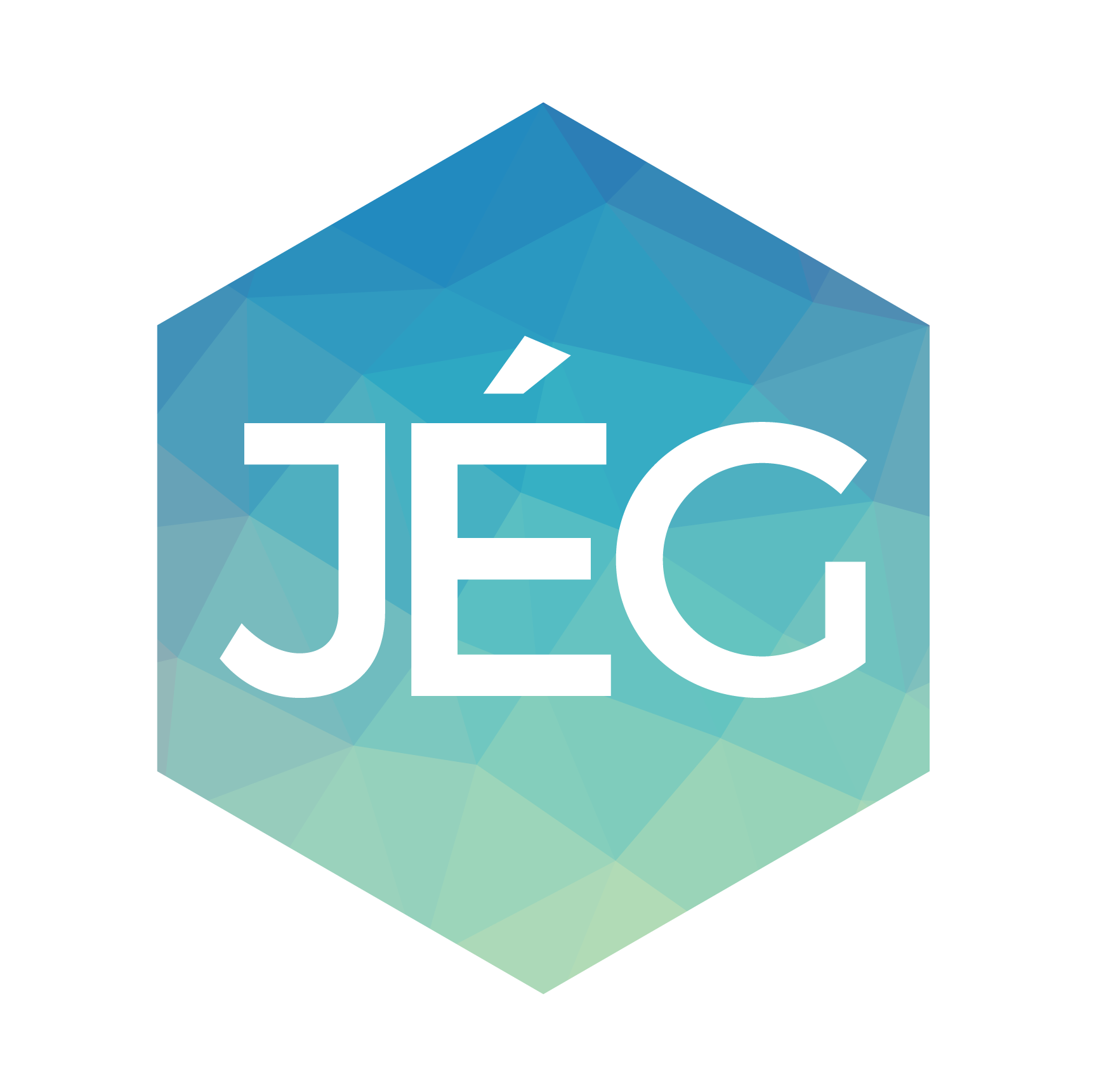 Jövőt Építők Generációja Egyesület logója